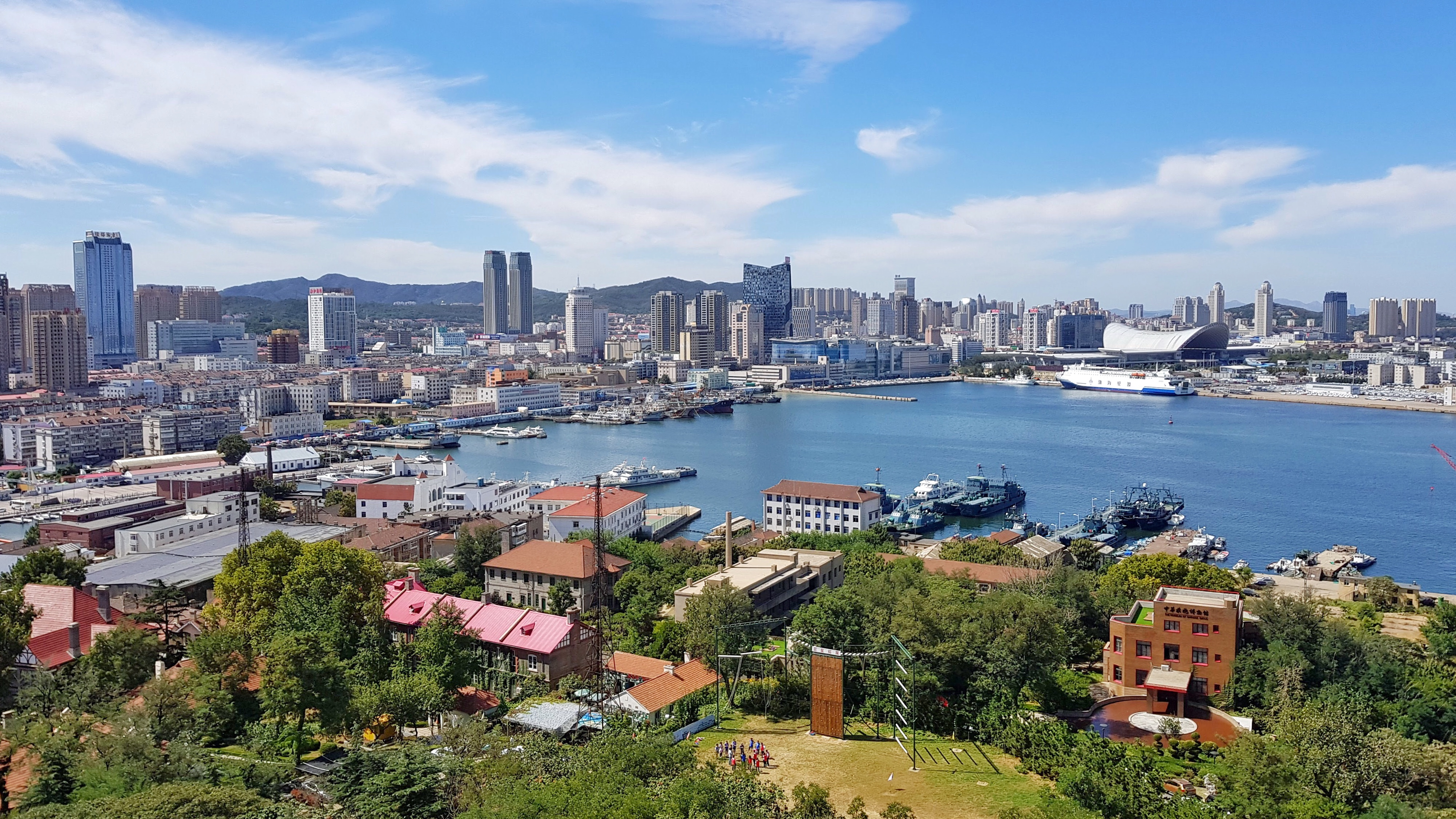 Chefoo Bay of Yantai